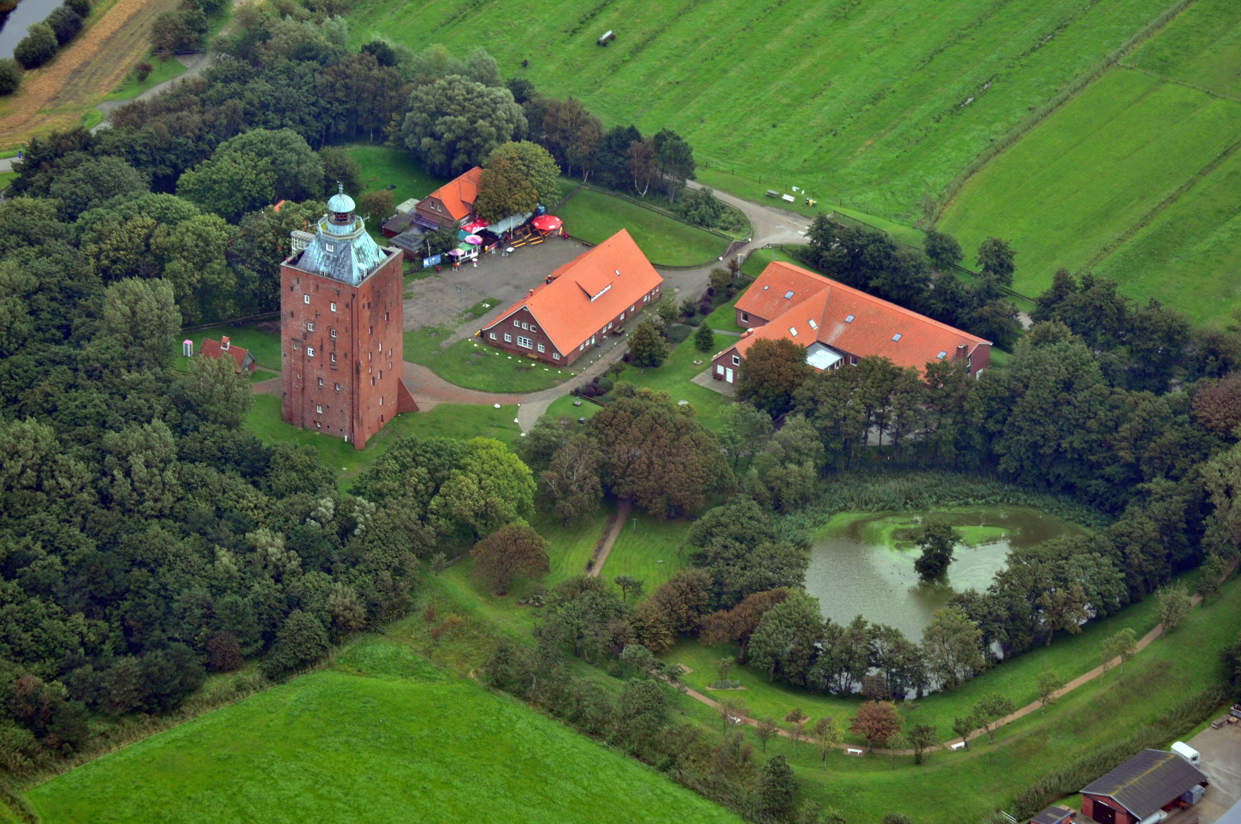 Fotoflug Nordsee, Leuchtturm Neuwerk